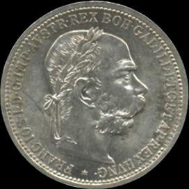 1 corona, 1901 (Austria) - obverse